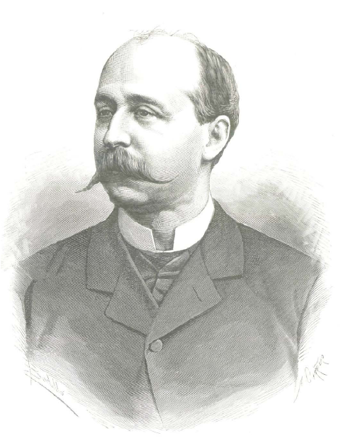 Grabado de Segismundo Moret y Prendergast en la Ilustración Española y Americana en 1881.